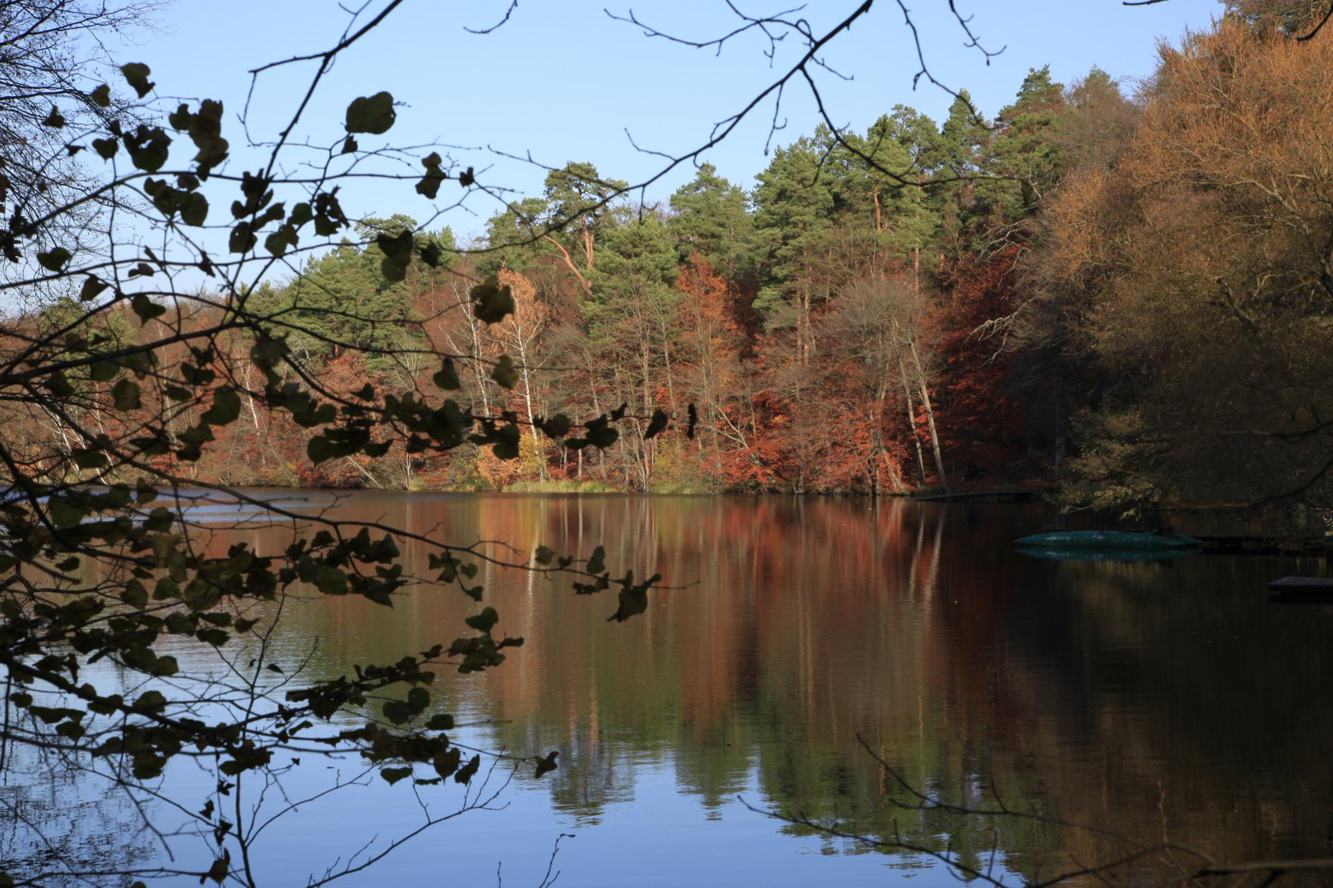 Jesienny widok